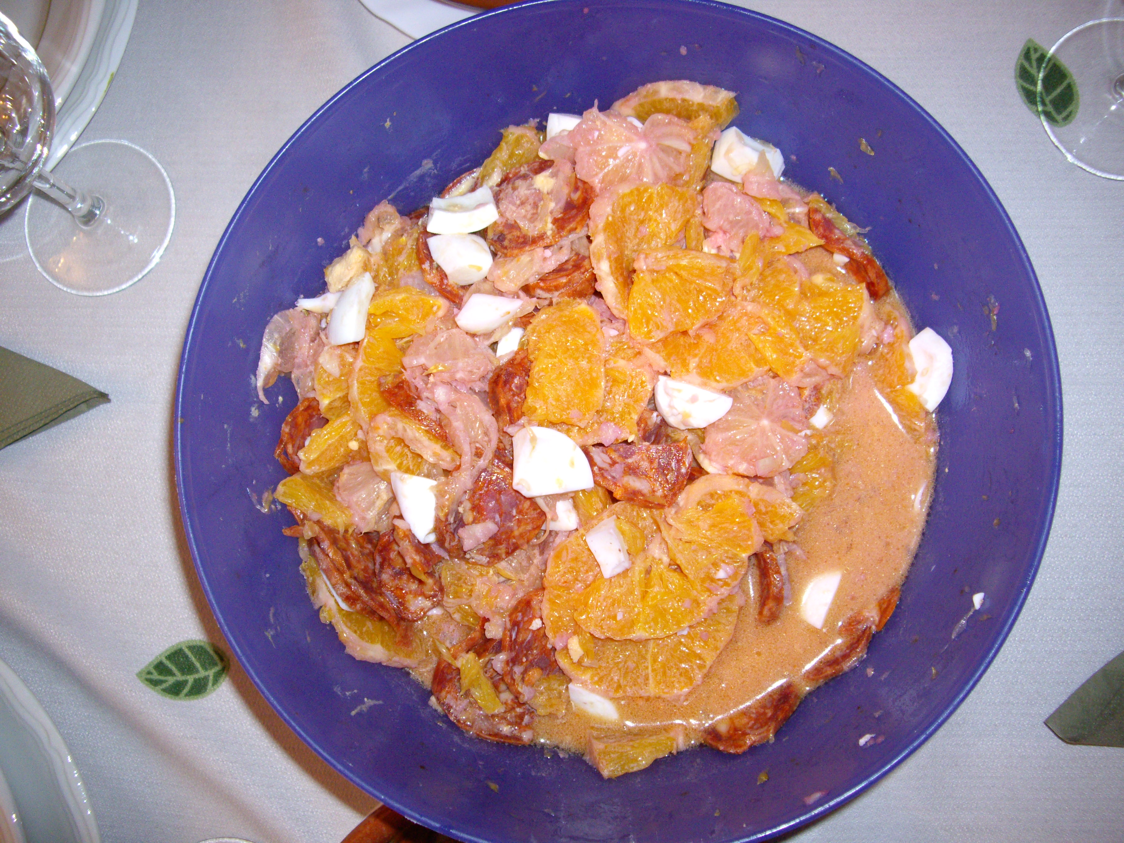 Limones, plato típico de la Semana Santa de Salamanca, a base de naranja, limón, huevo, chorizo, aceite y vinagre